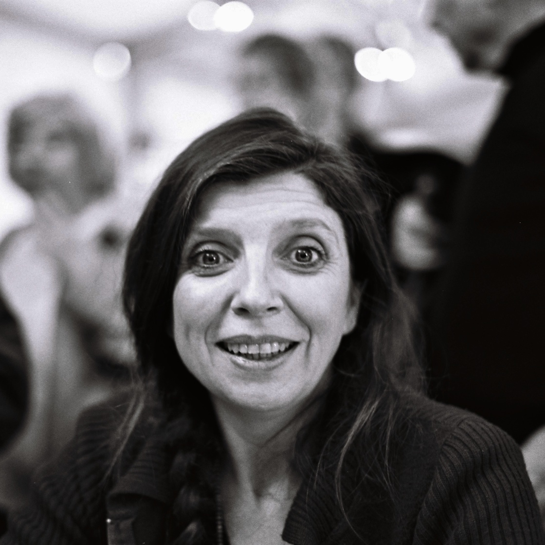 Carole Martinez au salon du livre Radio France, 26 novembre 2011